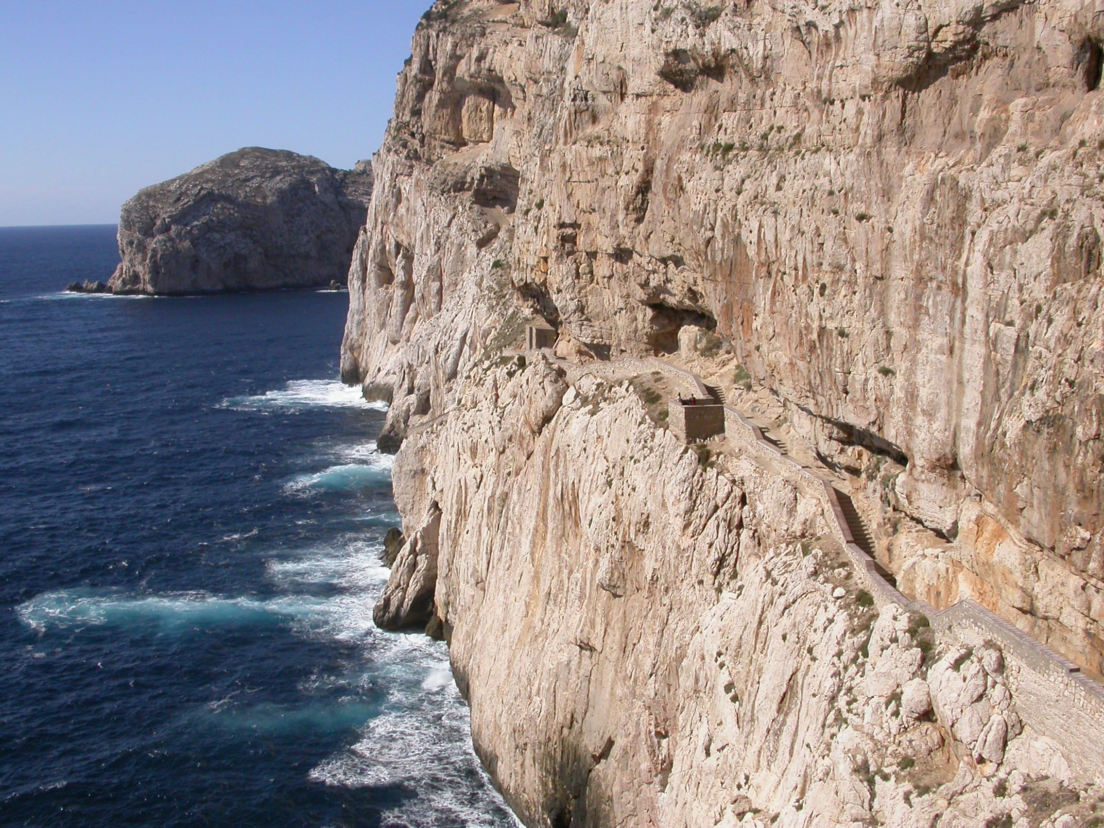 Zugang zur Grotta di Nettuno